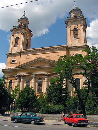 Cluj-Napoca, Biserica Reformată-Calvină din Orașul de Jos (Bulev. 21 Decembrie 1989 nr.41)